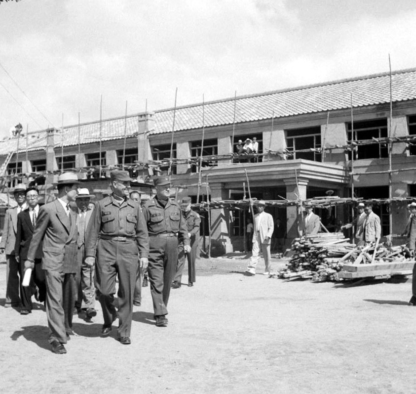 외국인관계자가 AFAK의 자재원조로 대구시청사 및 각학교 공사현장 둘러보는 모습